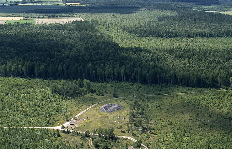 Motiv: Majsterrojr Nyckelord: Flygbilder, Riksintressen Kategori: Röse .